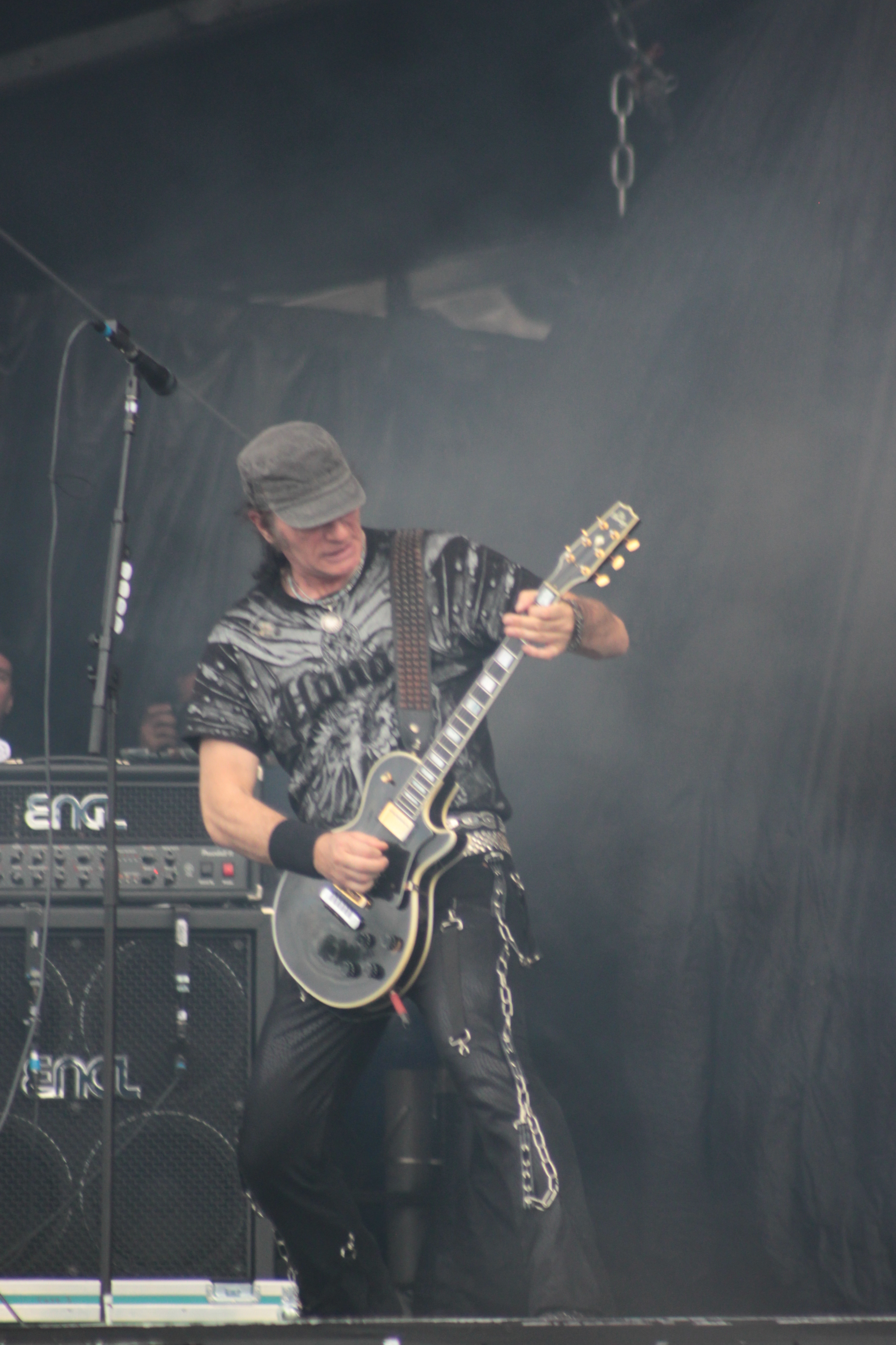 Herman Frank, Accept, Helfest 2013, Fr-44-Clisson.